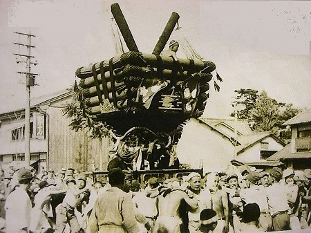 大正5年の本宮かきあい